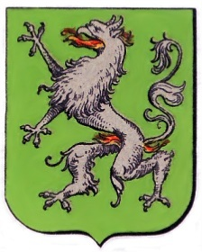 Historisches (also nicht mehr verwendetes) Wappen der Stadt Steyr. Der Panther speit aus sämtlichen Körperöffnungen Feuer (ähnlich dem Panther auf den Grazer Wappen). Farblithografie (1895)